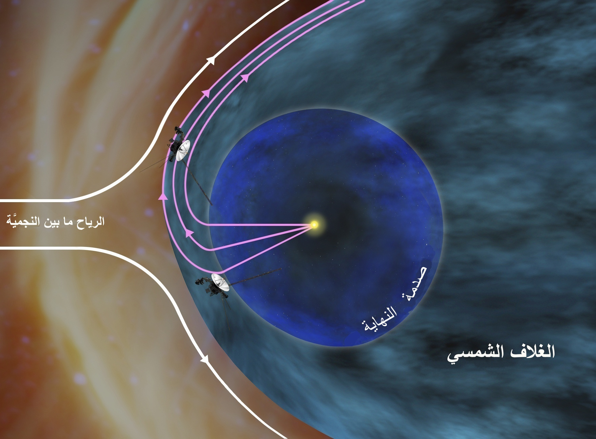 بتاريخ 21 تمُّوز (يوليو) 2012م، أشارت أداة مقياس المغنطيسية أنَّ مسبار ڤوياجر 1 دخل منطقةً حيثُ تهبُّ الرياح من النصف الجنوبي للكُرة الأرضيَّة. فسَّر العُلماء هذا بأنَّ معناه وُصول المركبة الفضائيَّة إلى المنطقة الأخيرة السابقة للفضاء ما بين النجمي نظرًا لأنَّ التيَّارات الهوائيَّة الجنوبيَّة عليها أن تتدفَّق خارج وحول الرياح الشماليَّة كي تبلغ موقع ڤوياجر 1. يظهرُ في هذا الرسم كُلًا من مسبار ڤوياجر 1 وهو فوق المركز، ومسبار ڤوياجر 2 الذي يقع أسفله.